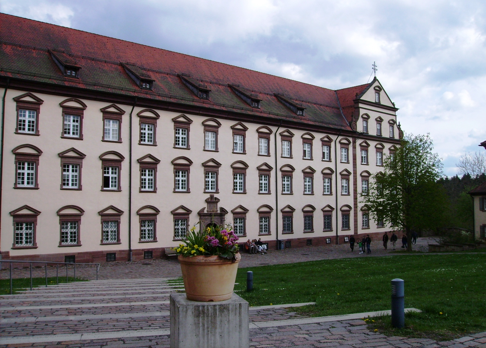 Kloster Kirchberg, Baden-Württemberg, Deutschland. Konventgebäude mit einer 60 m breiten, schlossähnlichen Front mit volutengezierten Barockgiebeln. Baumeister um 1733 war Joseph Feuerstein aus Rottweil.